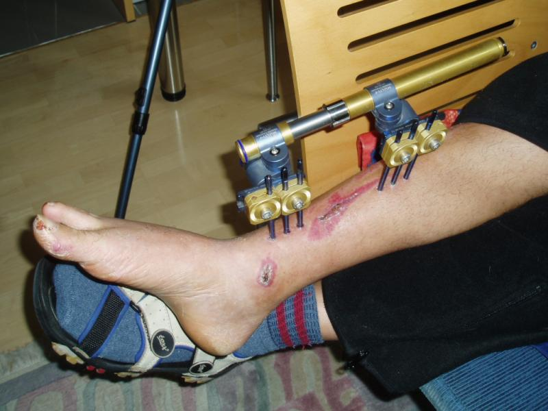 Unilateraler Fixateur externe